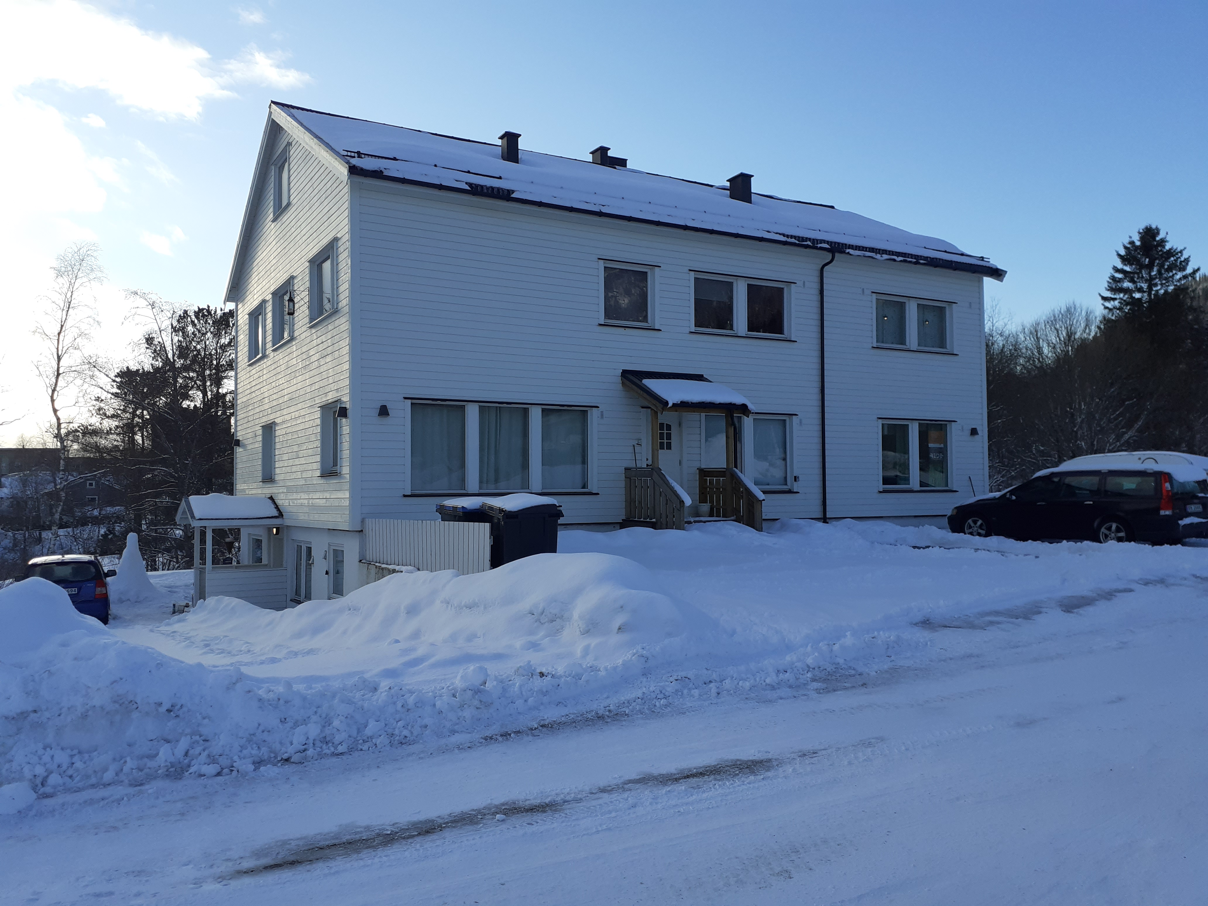 Brennslettveien borettslag (Brennslettveien 1) på Selfors, fotografert med en Samsung Galaxy A10 smarttelefon